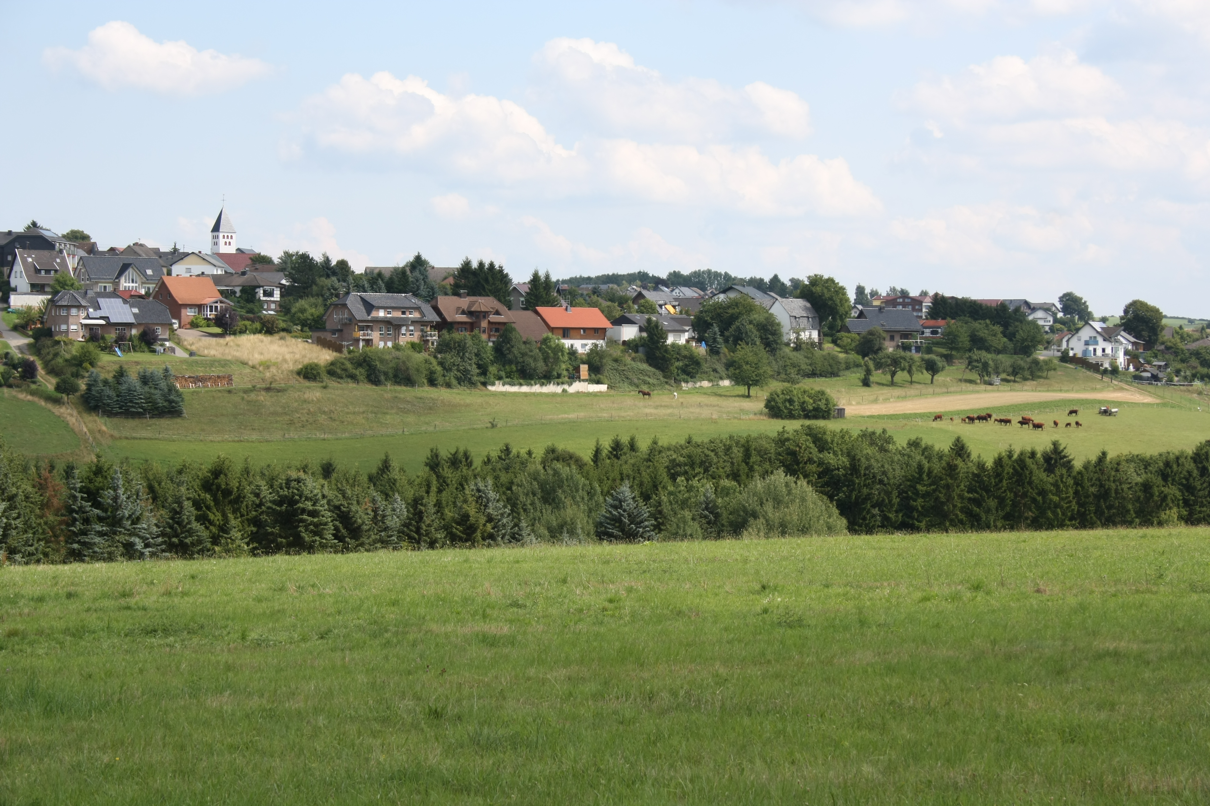 Ansicht von Wershofen